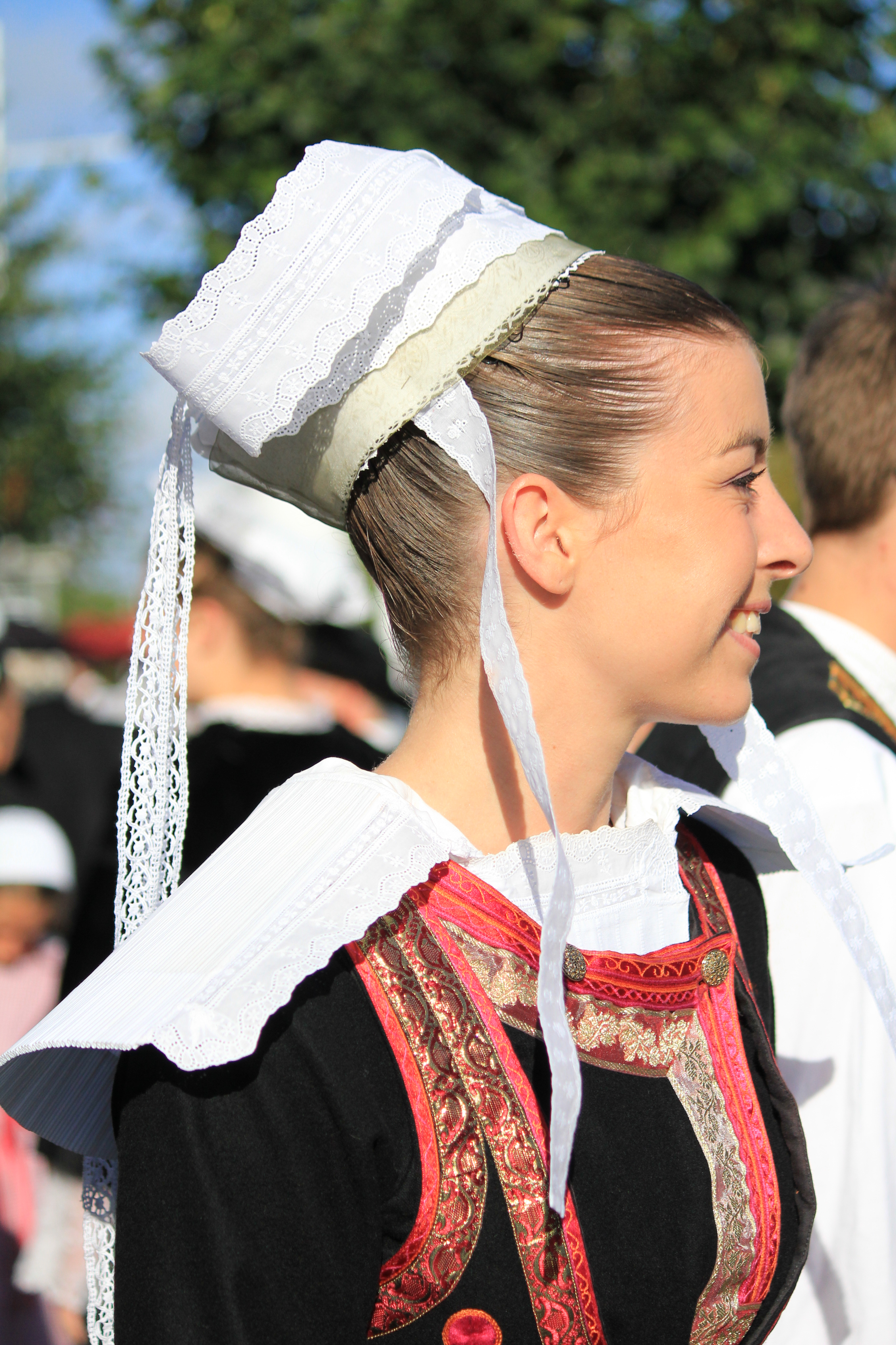 coiffe bretonne (de la région de Châteaulin/ Pays Rouzig ???) pendant le FIL 2012